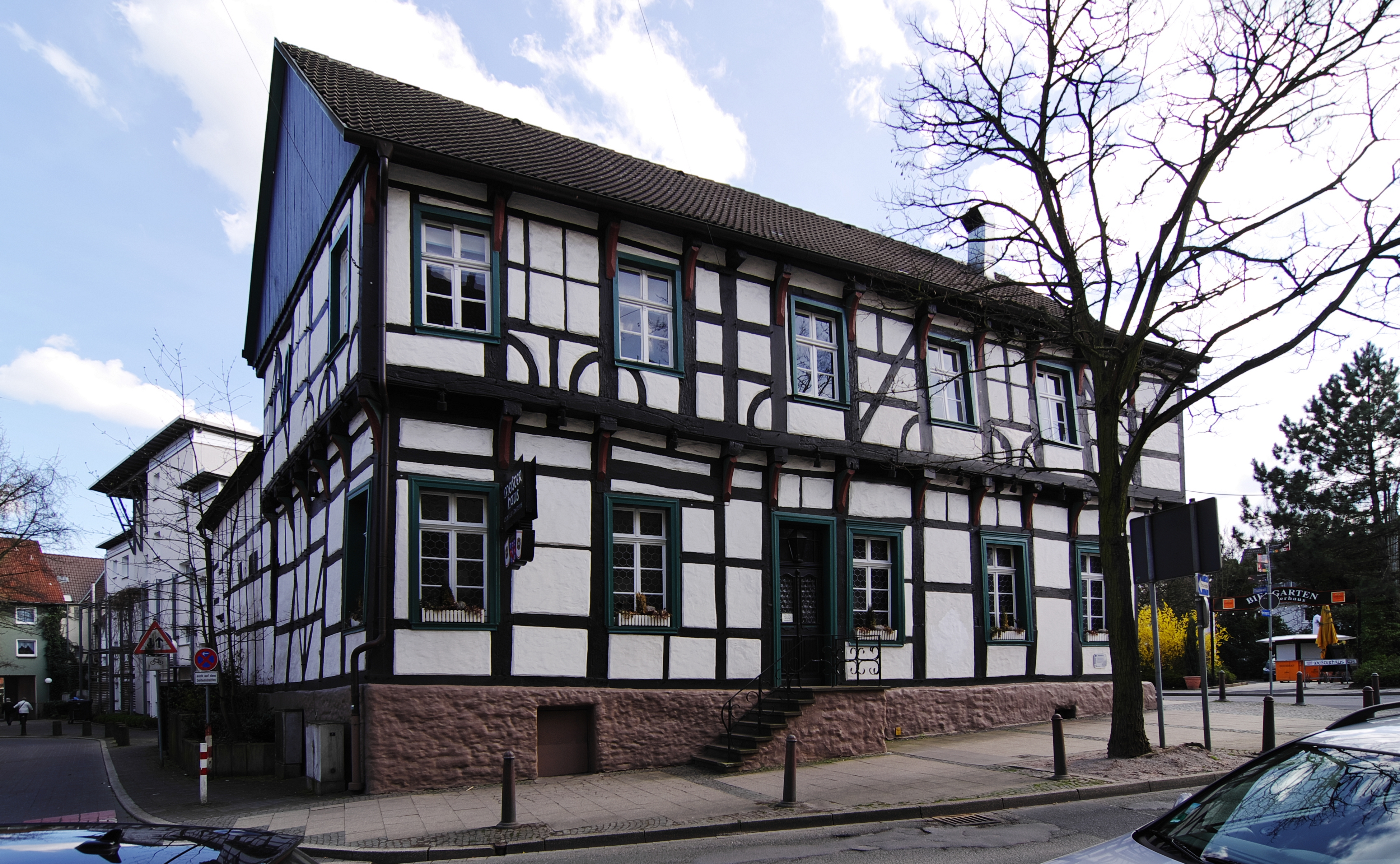 Baudenkmal in Unna, Hertingerstr. 32, A 067